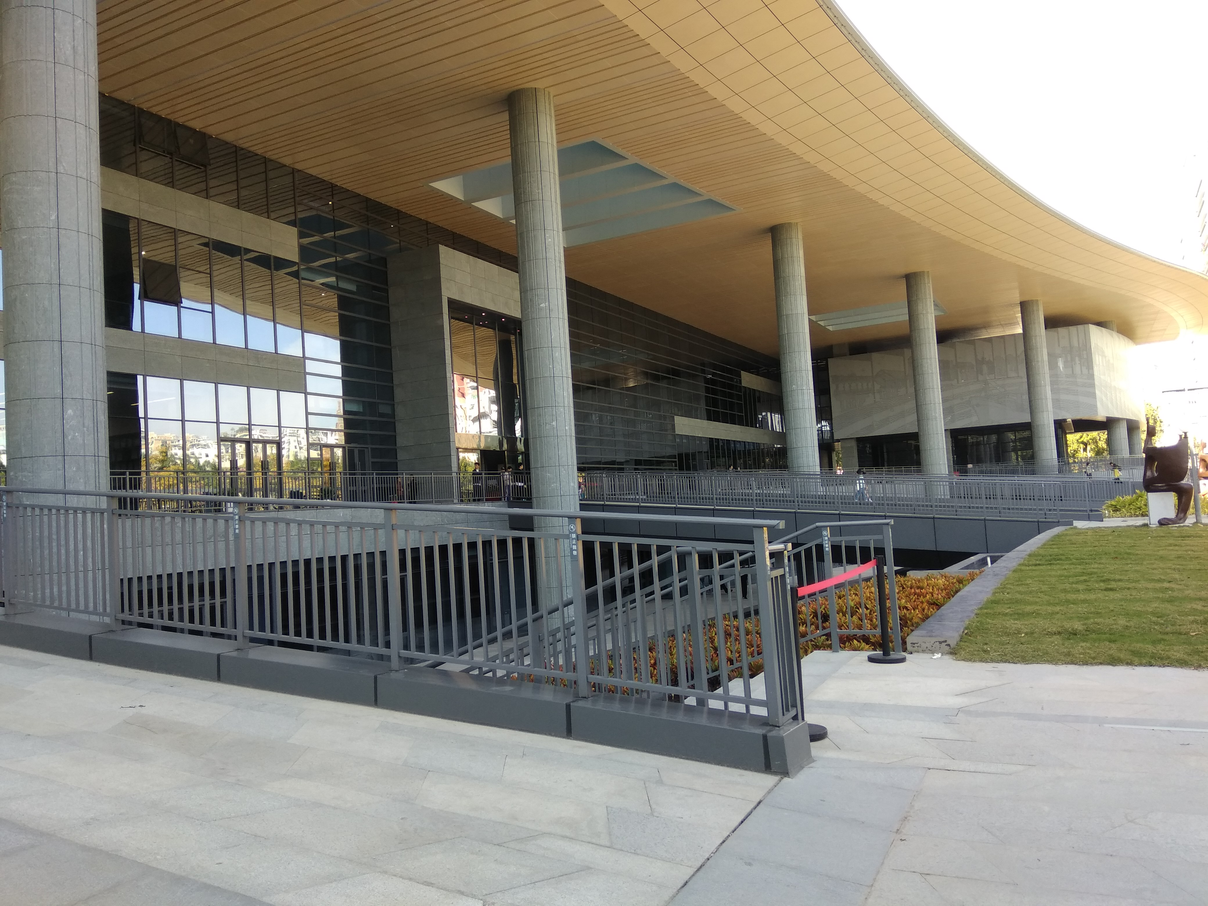 中文（中国大陆）: 中山纪念图书馆